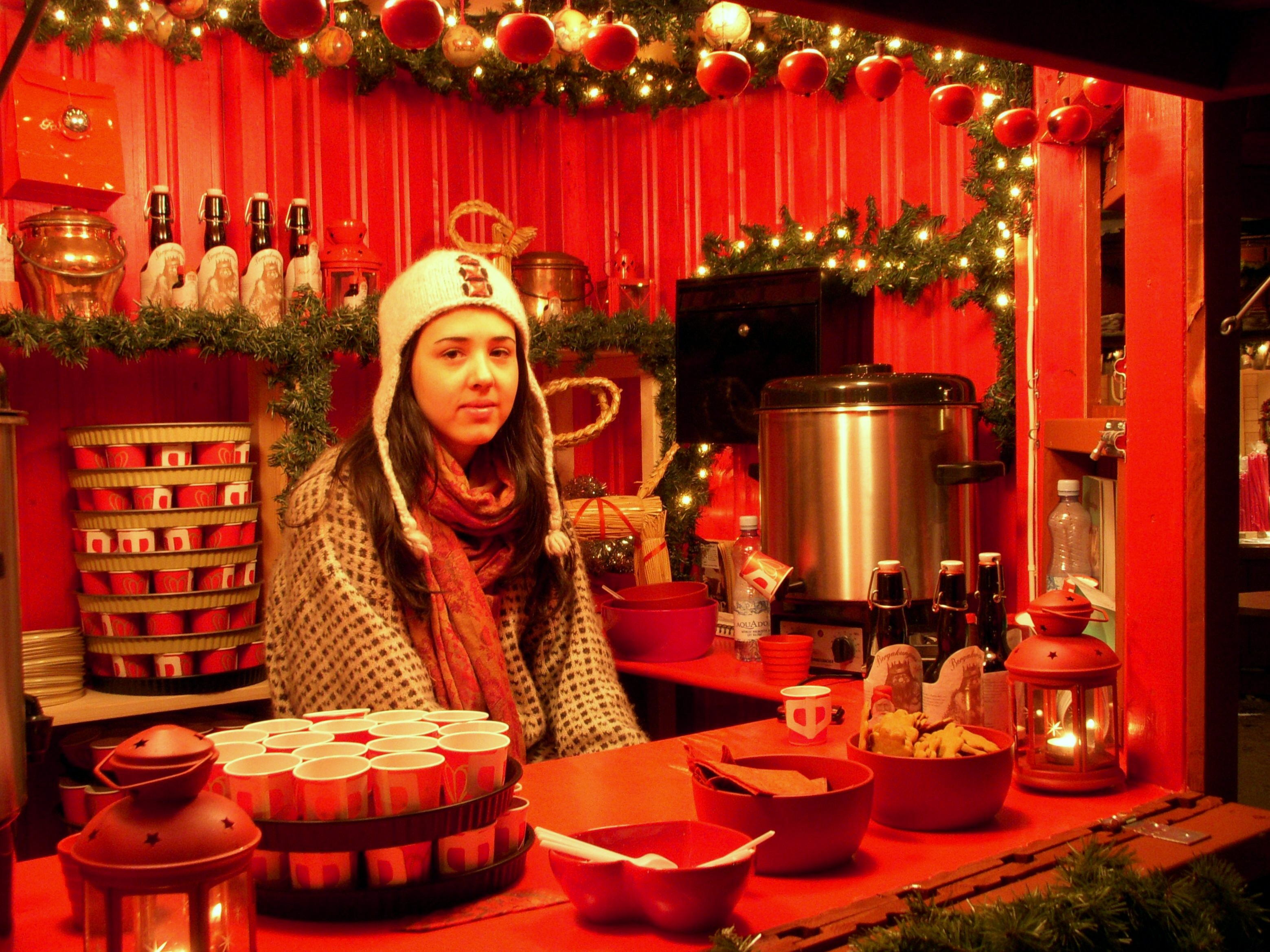 Julmarknad i Gamla stan